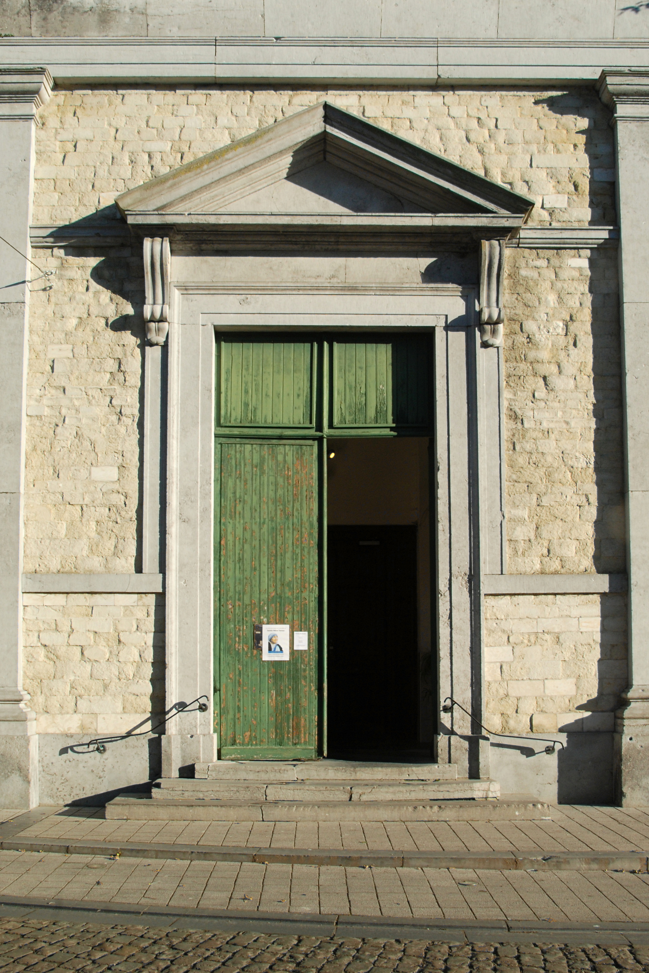 Belgique - Brabant wallon - Église Saint-Jean l'Évangéliste de Genappe